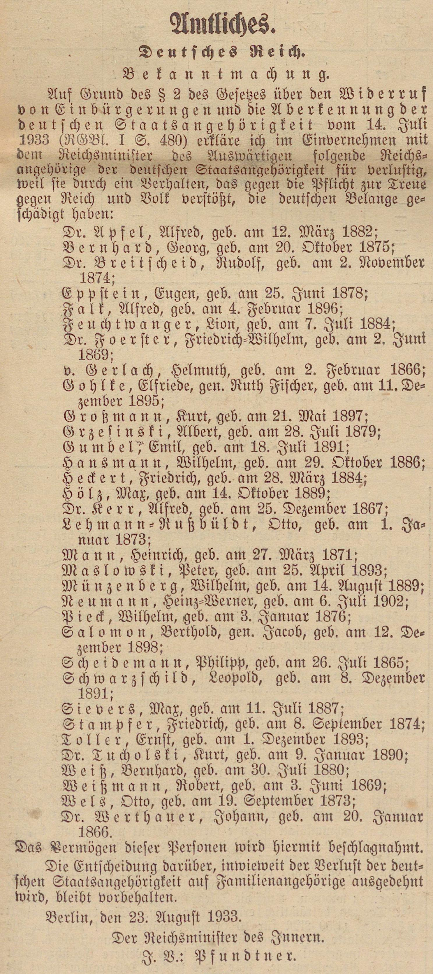 Faksimile der ersten Ausbürgerungsliste des Deutschen Reiches vom 25. August 1933